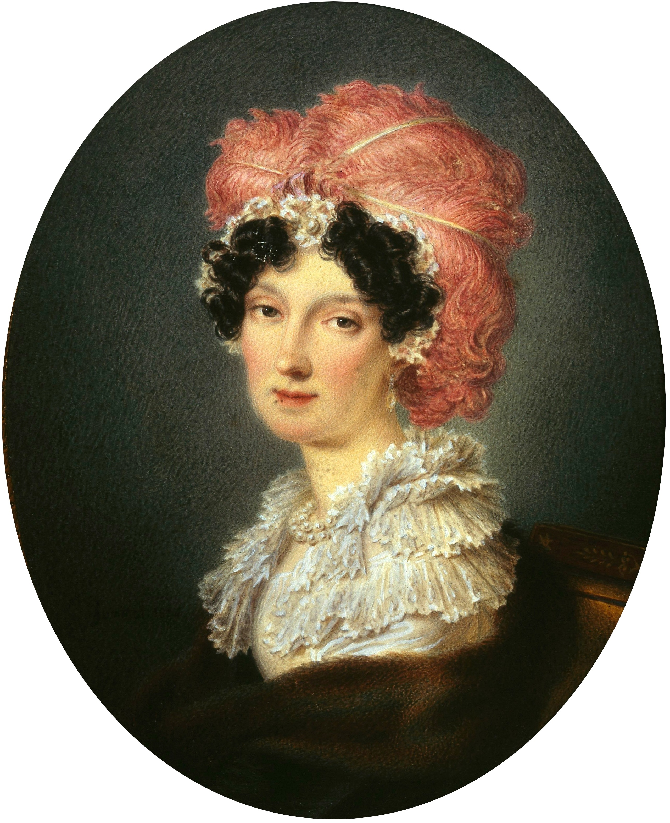 Графиня Софья Ксаверьевна Потоцкая, урожд. графиня Браницкая (1790–1879)